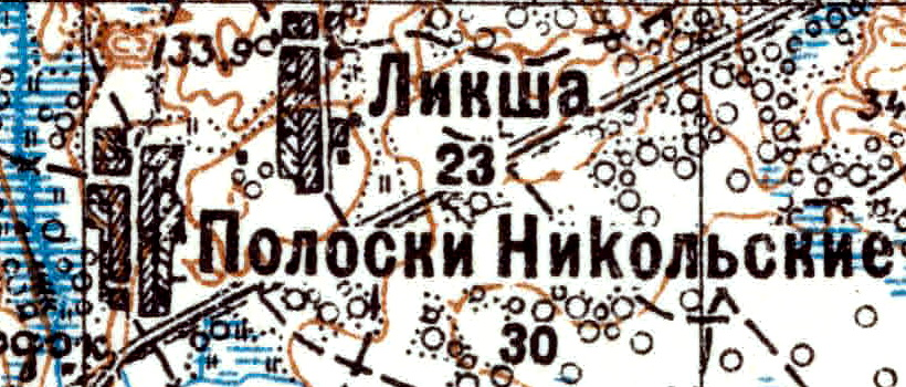 Топографическая карта Ленинградской области, квадрат VIc-26 (Ставотино), деревня Полоски